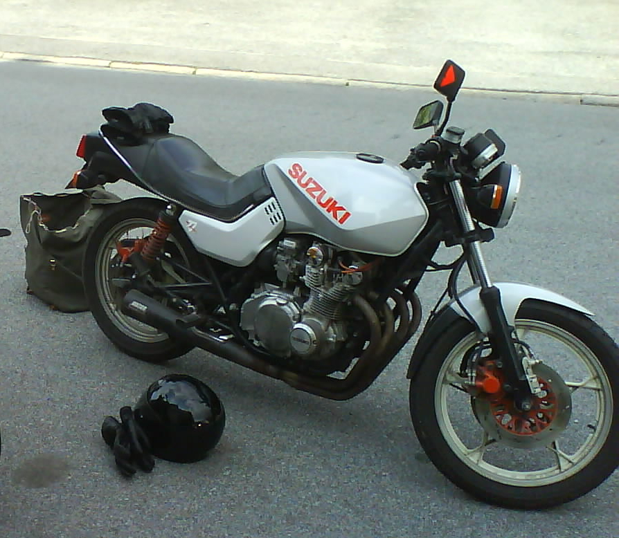 Suzuki GS650G Katana